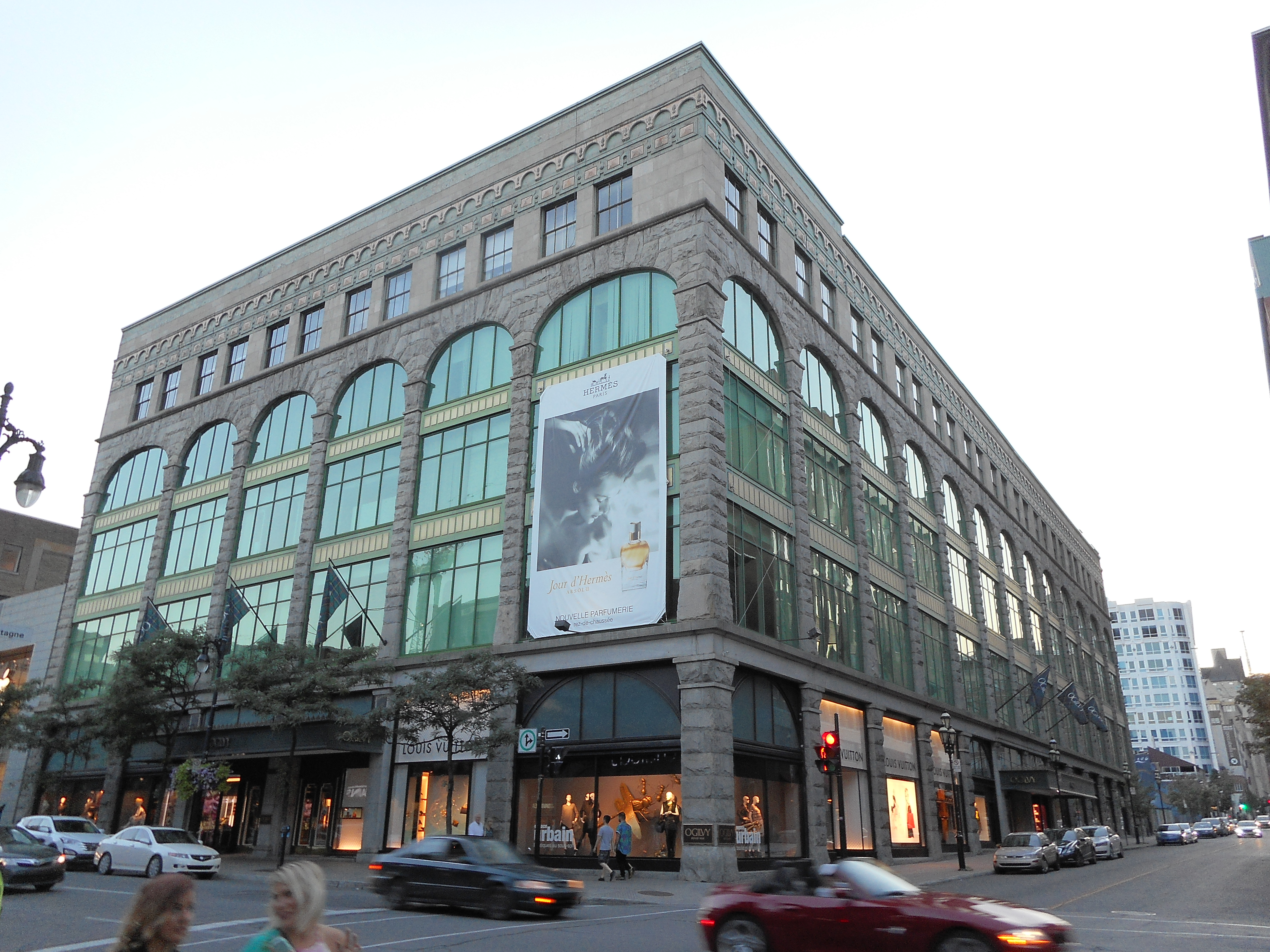 Ogilvy, 1307, rue Sainte-Catherine Ouest, Montréal